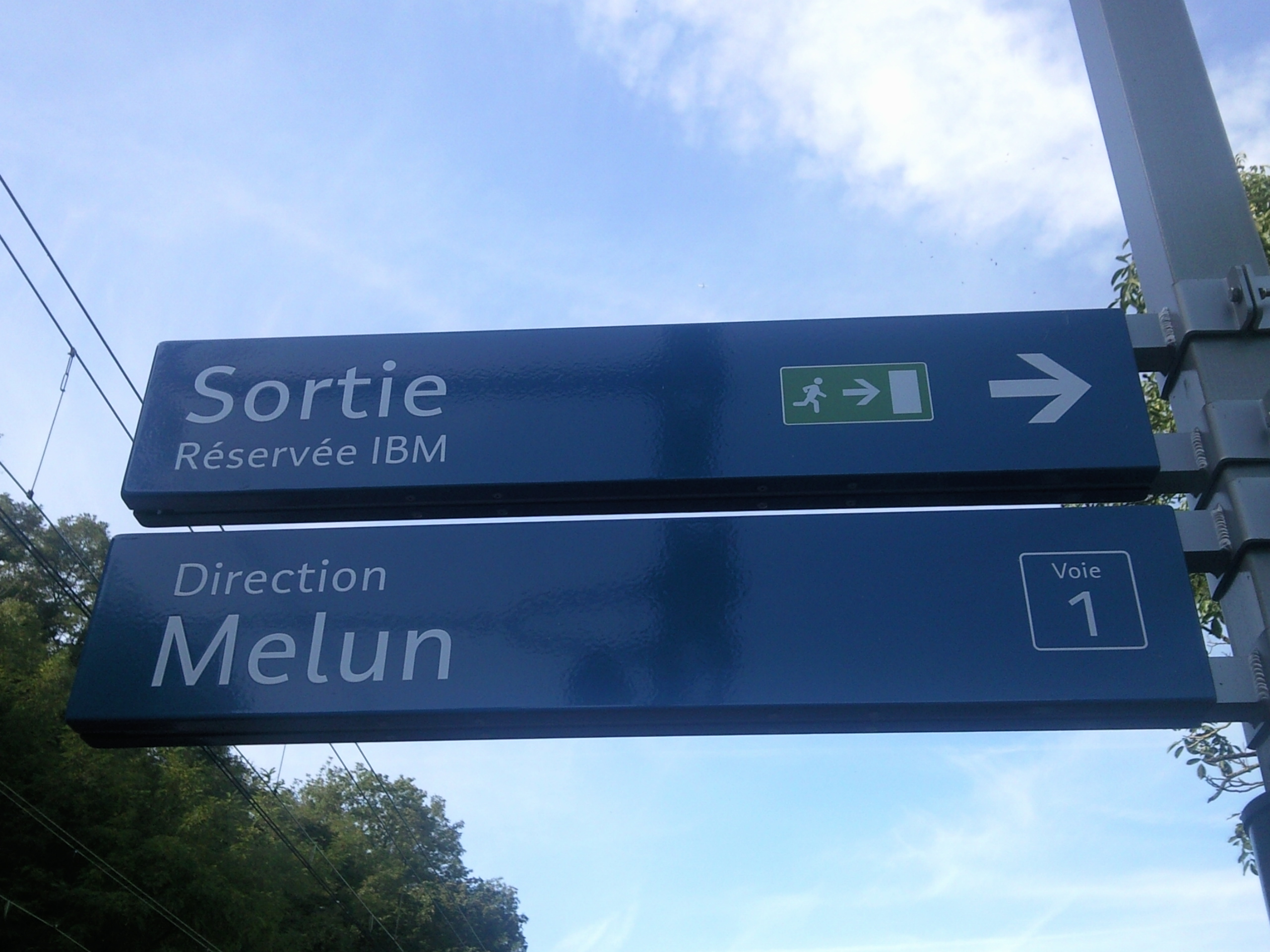 Signalisation à la gare du Plessis Chenet